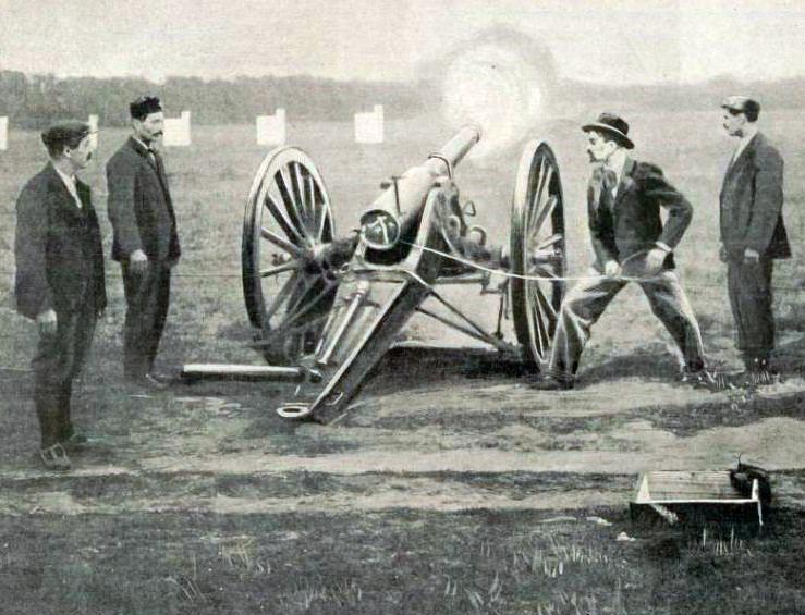 Concours de tir au canon de 90 à 60 mètres (avec des gargousses de tir réduit) lors de l'exposition universelle 1900, au polygone de Vincennes, 29 07 à 04 08 1900